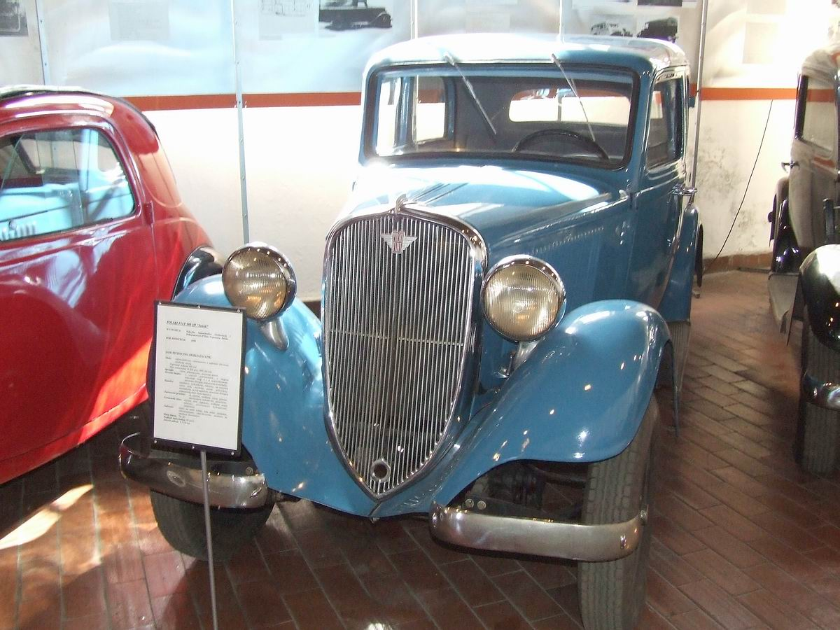 Polski Fiat 508 III Junak produced in PZInż in Warsaw